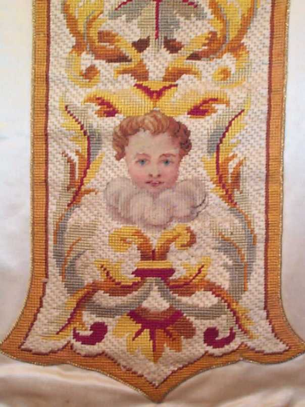 eigen foto, borduurwerk (Halve kruissteek) met engel